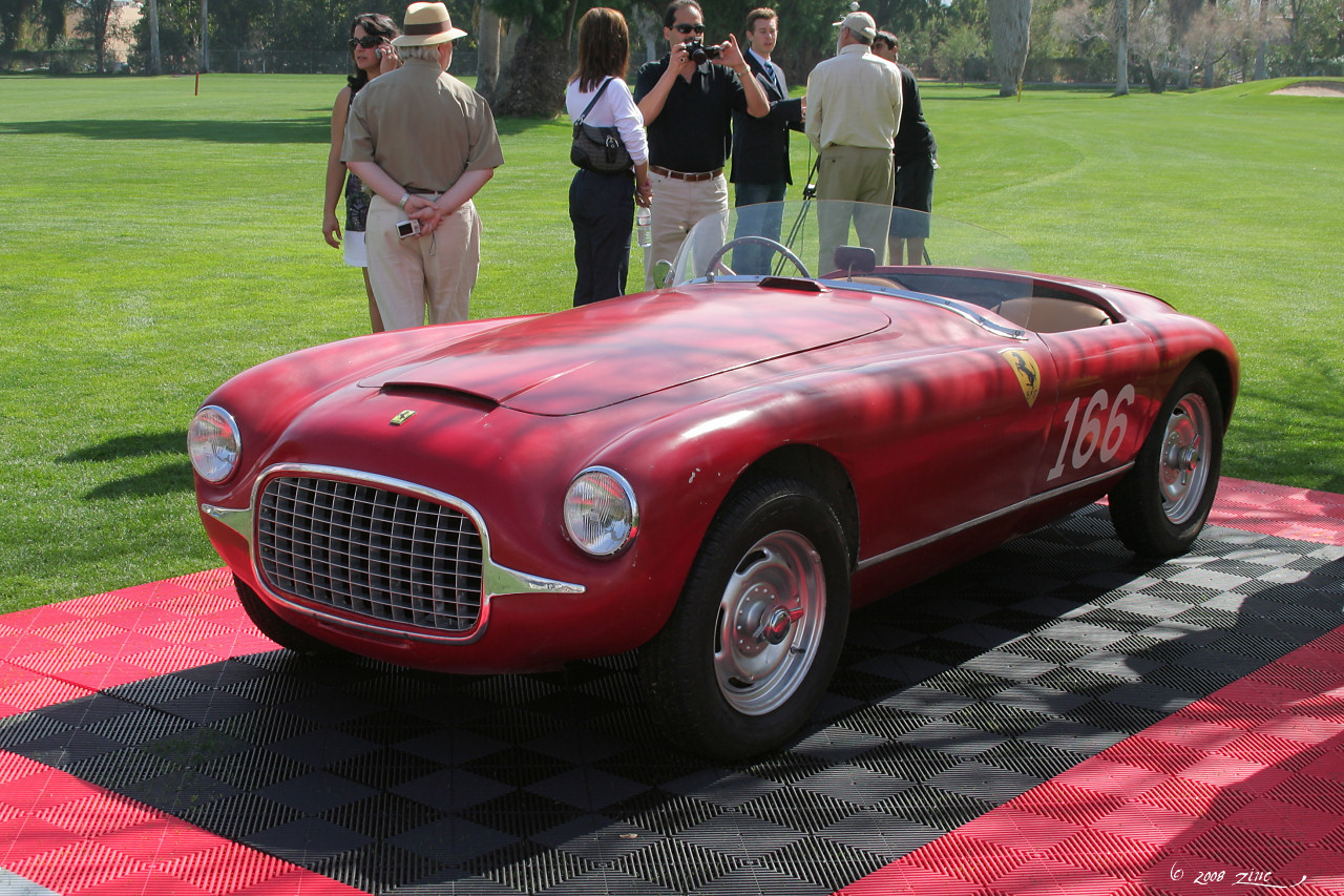 1948 Ferrari 166 MM Barchetta - chassis 01C - fvl